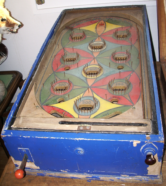 Flipperautomat von 1948